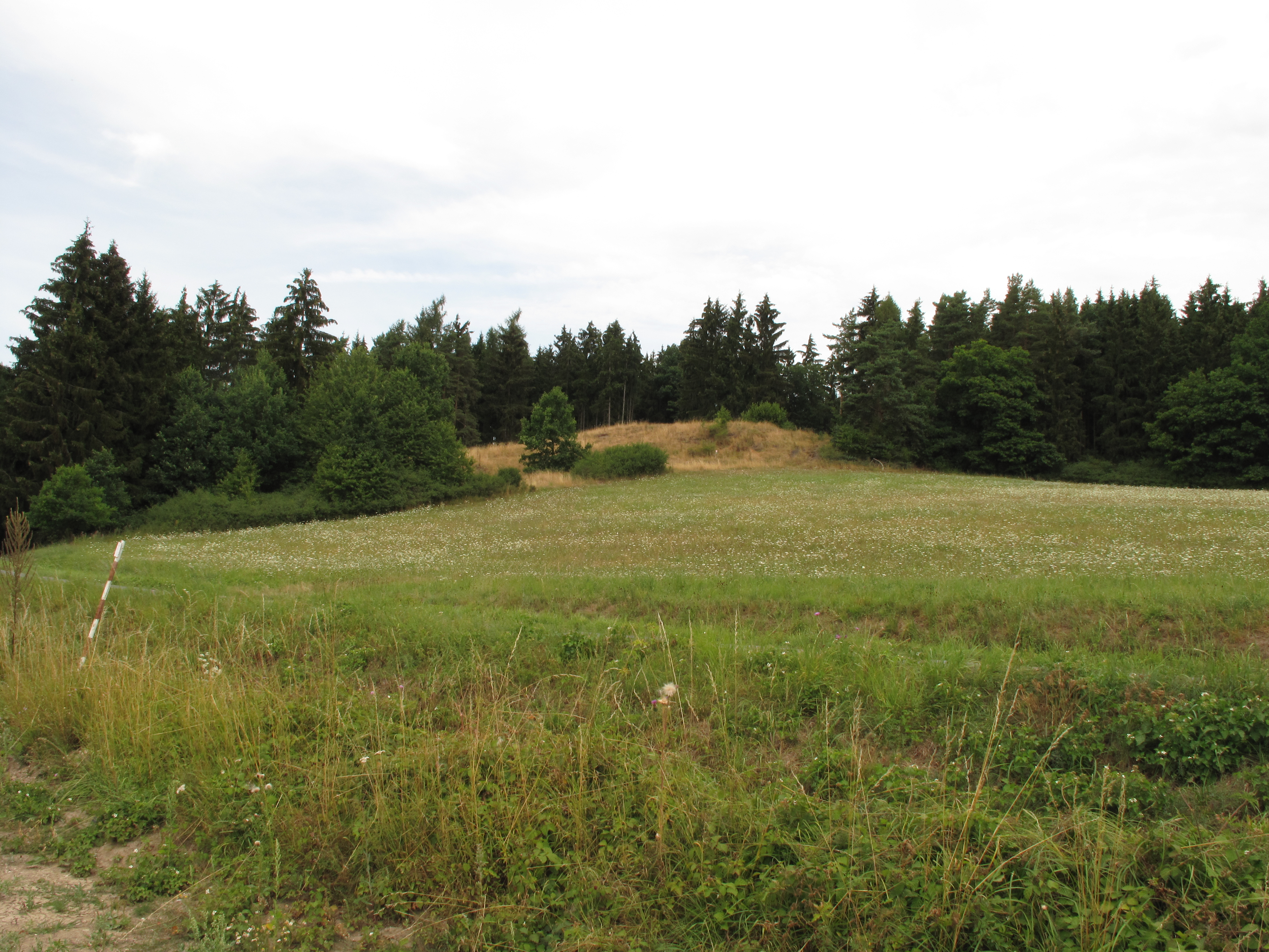 Přírodní památa Příšovská homolka. Okres Plzeň-sever, Česká republika.